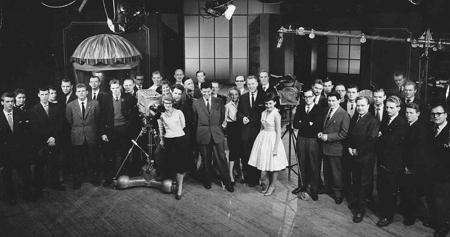 Bilden är tagen på Cirkus i samband med en Kvitt eller Dubbelt sändning. T.h. om kameran: Mona Haskel, scripta och Nils Erik Bæhrendtz, programledare sedan Birgit Porry ateljévärdinna, Tage Danielsson och Maud Jonsson, studiovärdinna.